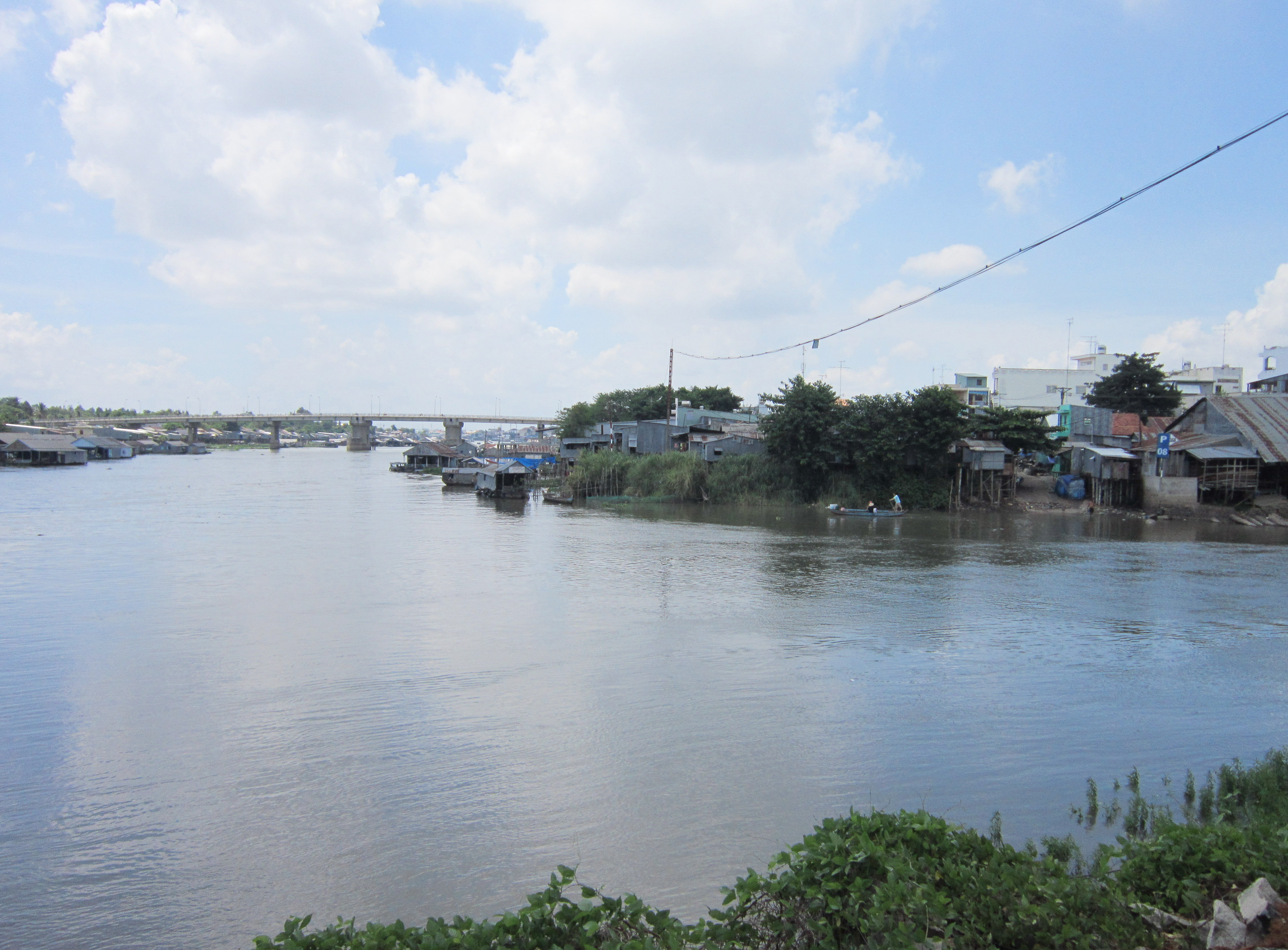 Sông Châu Đốc (thẳng) và kênh Vĩnh Tế (trái) ở phía trước đình Vĩnh Ngươn thuộc xã Vĩnh Ngươn, thị xã Châu Đốc, tỉnh An Giang, Việt Nam. Người dân gọi nơi đây là đầu vàm.